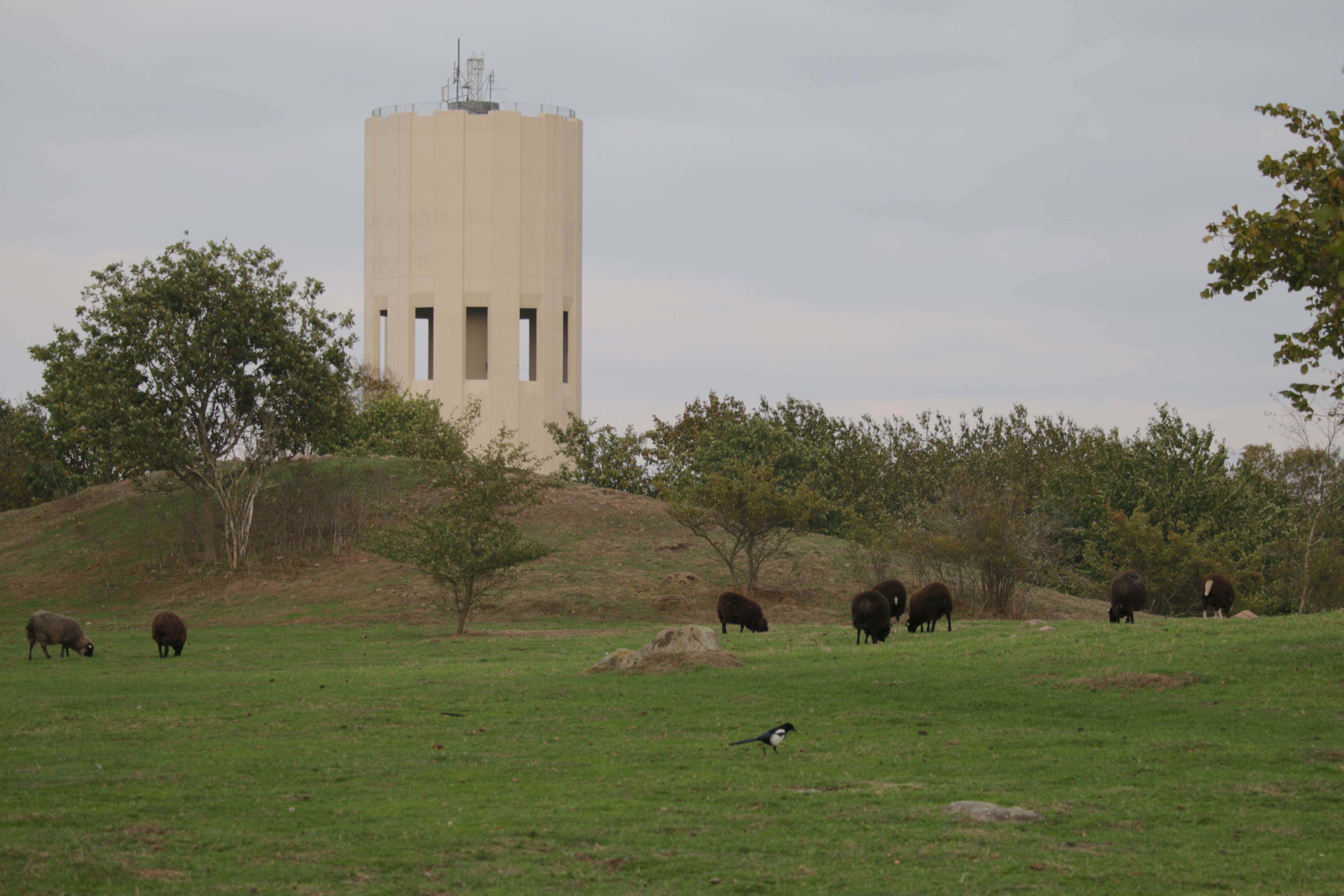 Rökepipans naturreservat med Dalby vattentorn